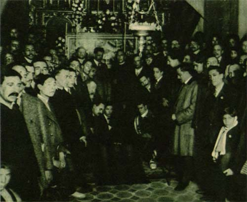 Sepulcro Rafael Casanova San Baudilio 1913